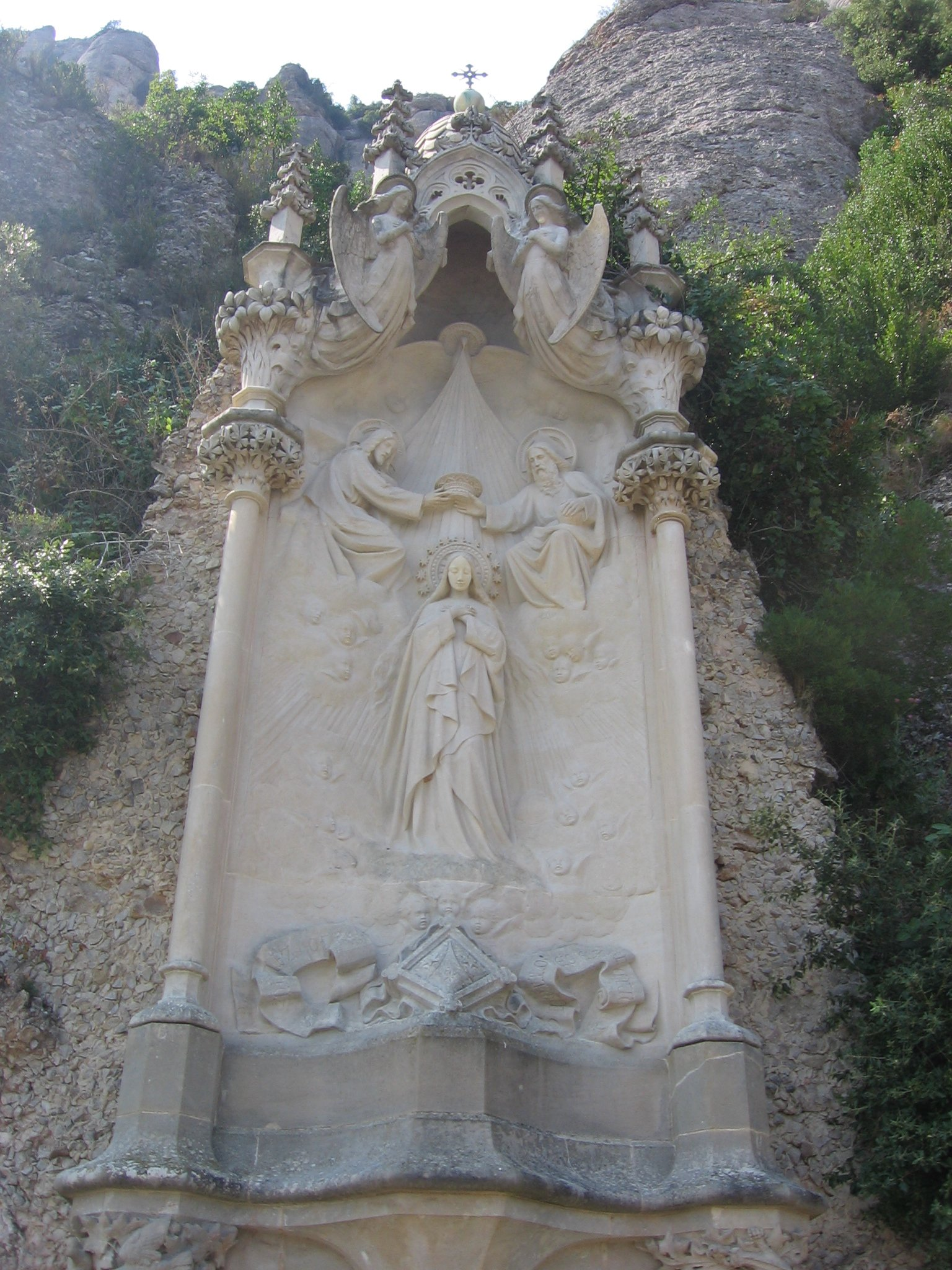 Rosario Monumental de Montserrat: Quinto Misterio de Gloria. La Coronación de la Virgen María. Obra de Joaquim Codina i Matalí con esculturas de Joan Flotats.